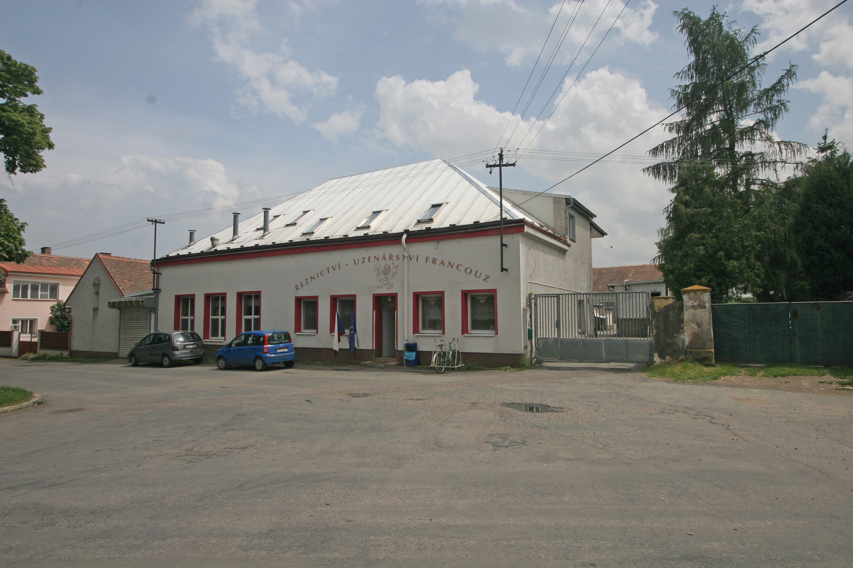 Skupice řeznictví